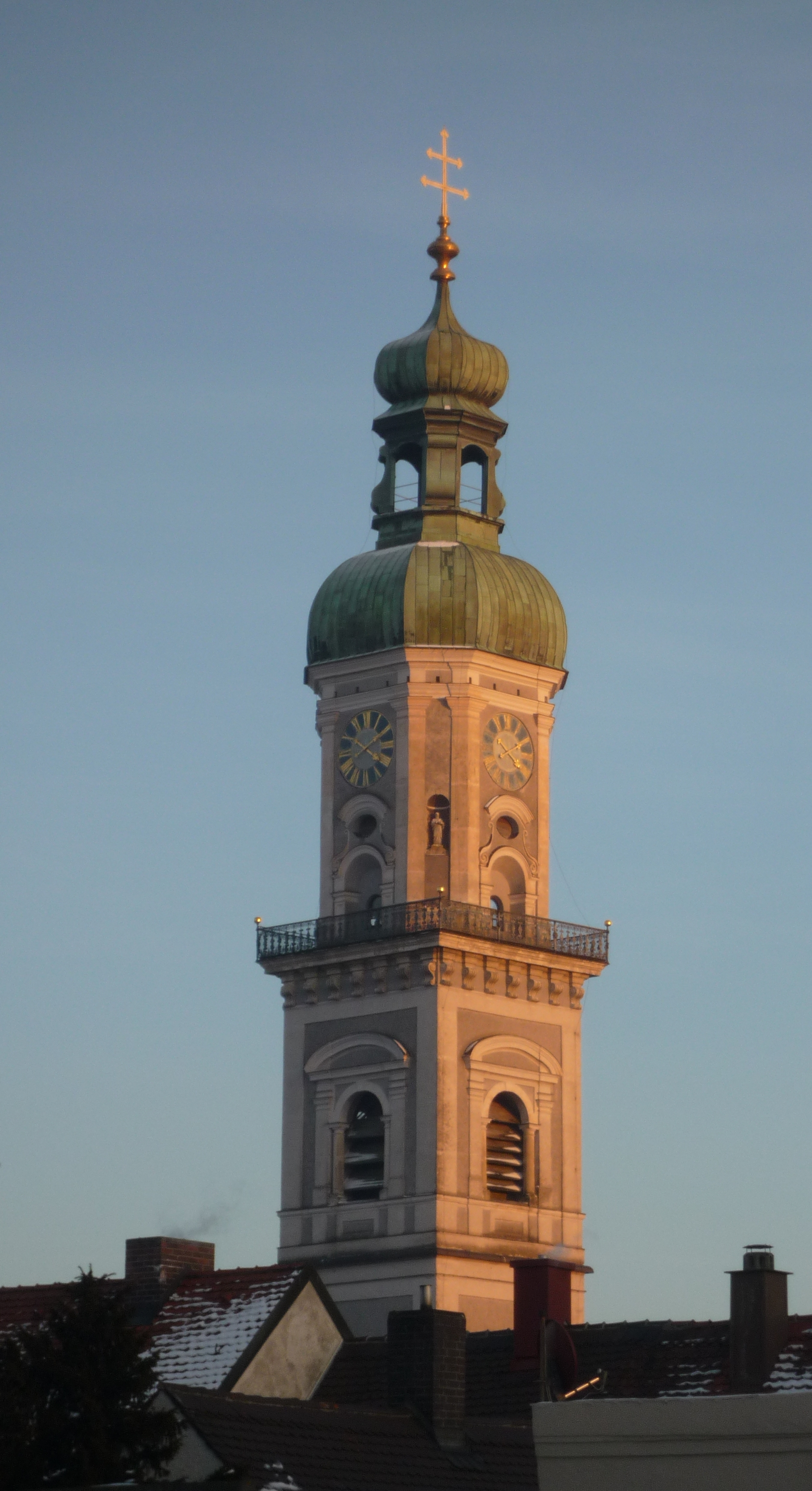 Turm der